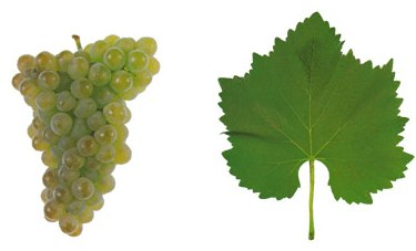 Traube und Blatt der Weißweinsorte 'Trajadura'